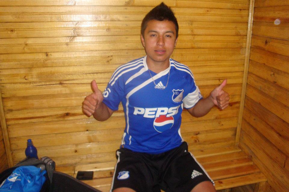 Millonarios FC